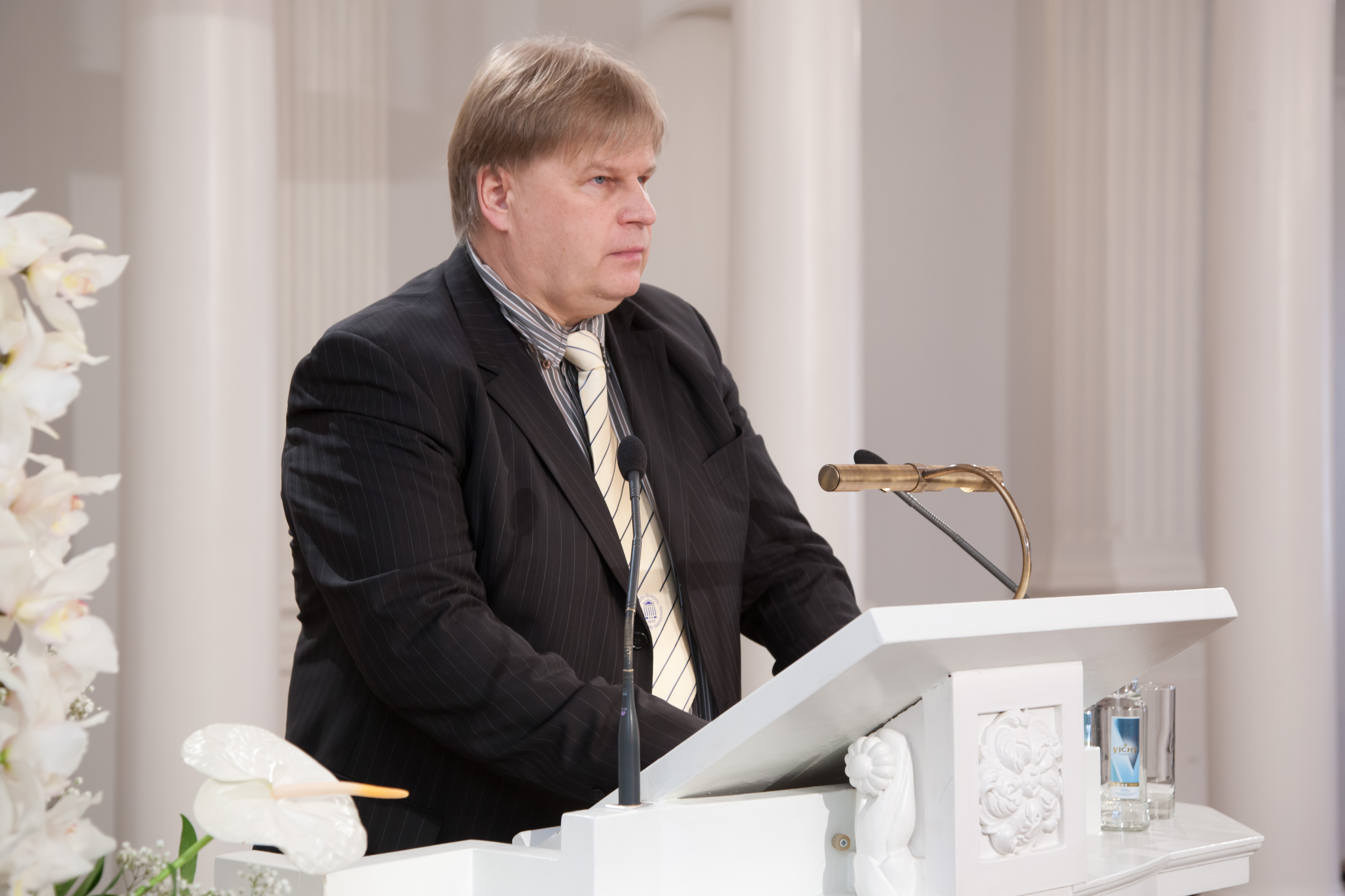 Arstiteaduskonna inimese füsioloogia professor, akadeemik Eero Vasar pidamas akadeemilist loengut "Pontes inter aetates et homines" (Sillad aegade ja inimeste vahel). Rahvusülikooli 92. aastapäeva aktus aulas – akadeemiline loeng, ülikooli audoktorite ning doktorite promoveerimine, auliikmete nimetamine, TÜ Rahvusmõtte auhinna üleandmine 1. detsembril 2011.